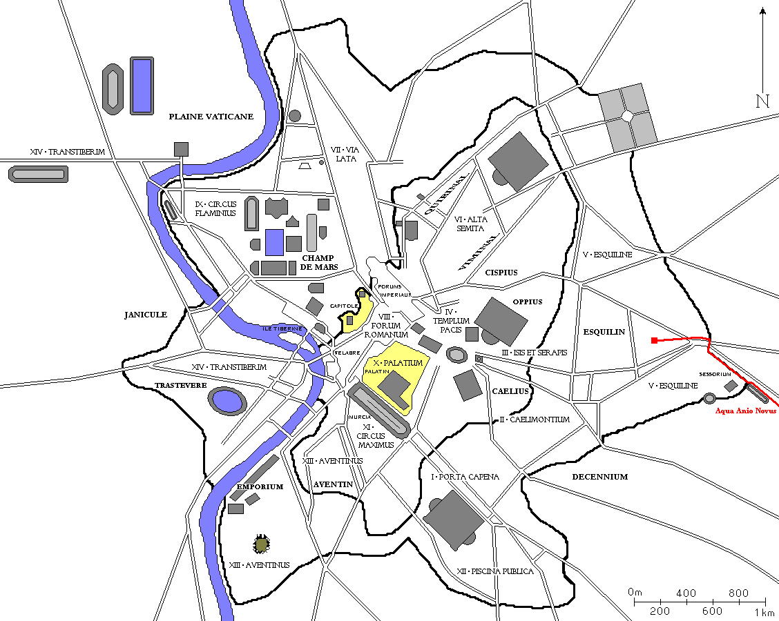 Plan de Rome avec l'Aqua Anio Novus en rouge